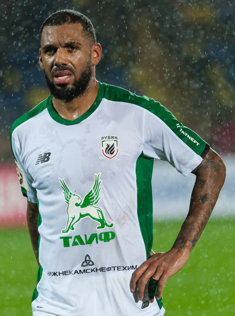 «Ростов» – «Рубин»